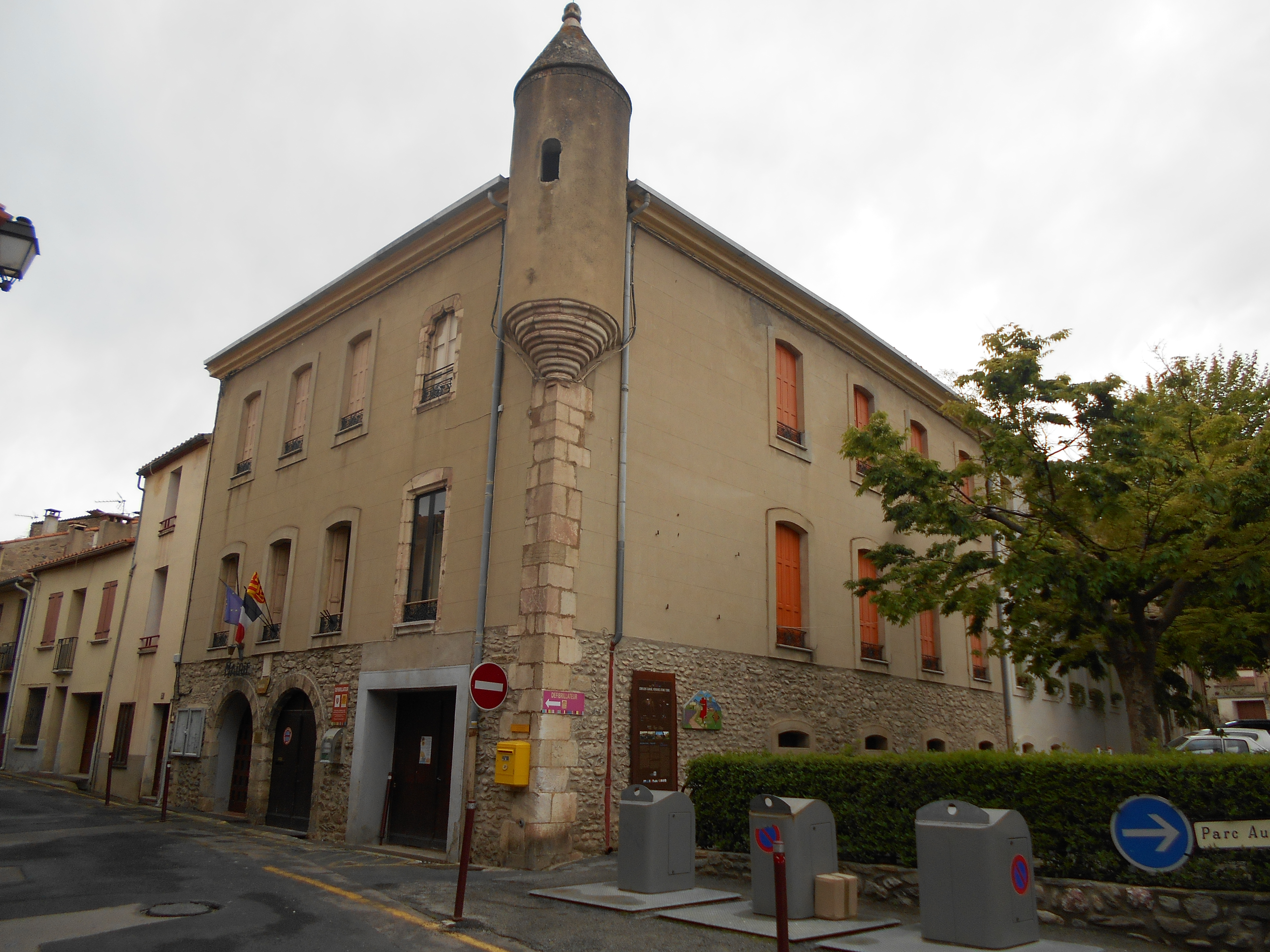 La Casa del Comú de Codalet